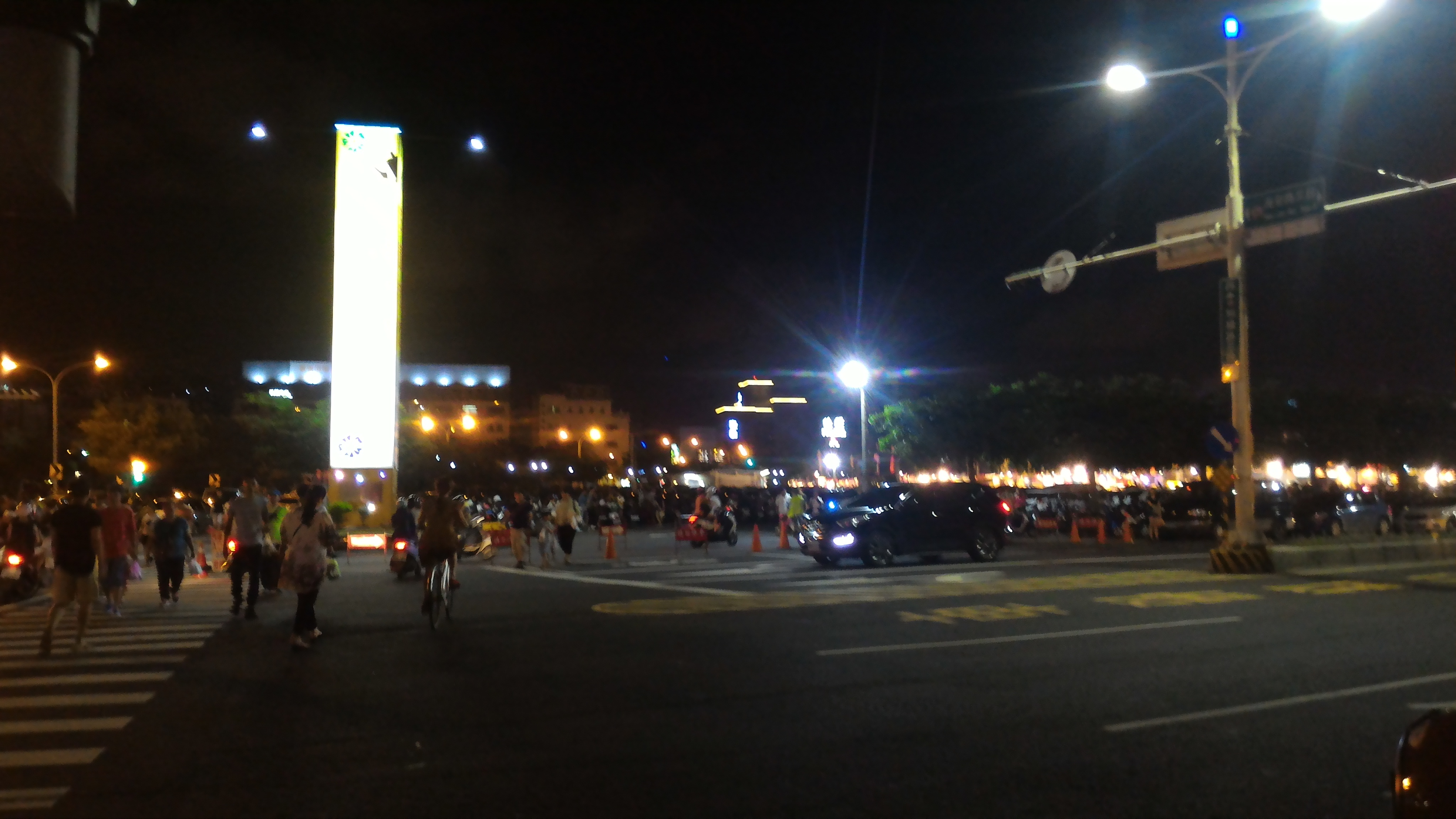 人來人往 台南花園夜市 路景